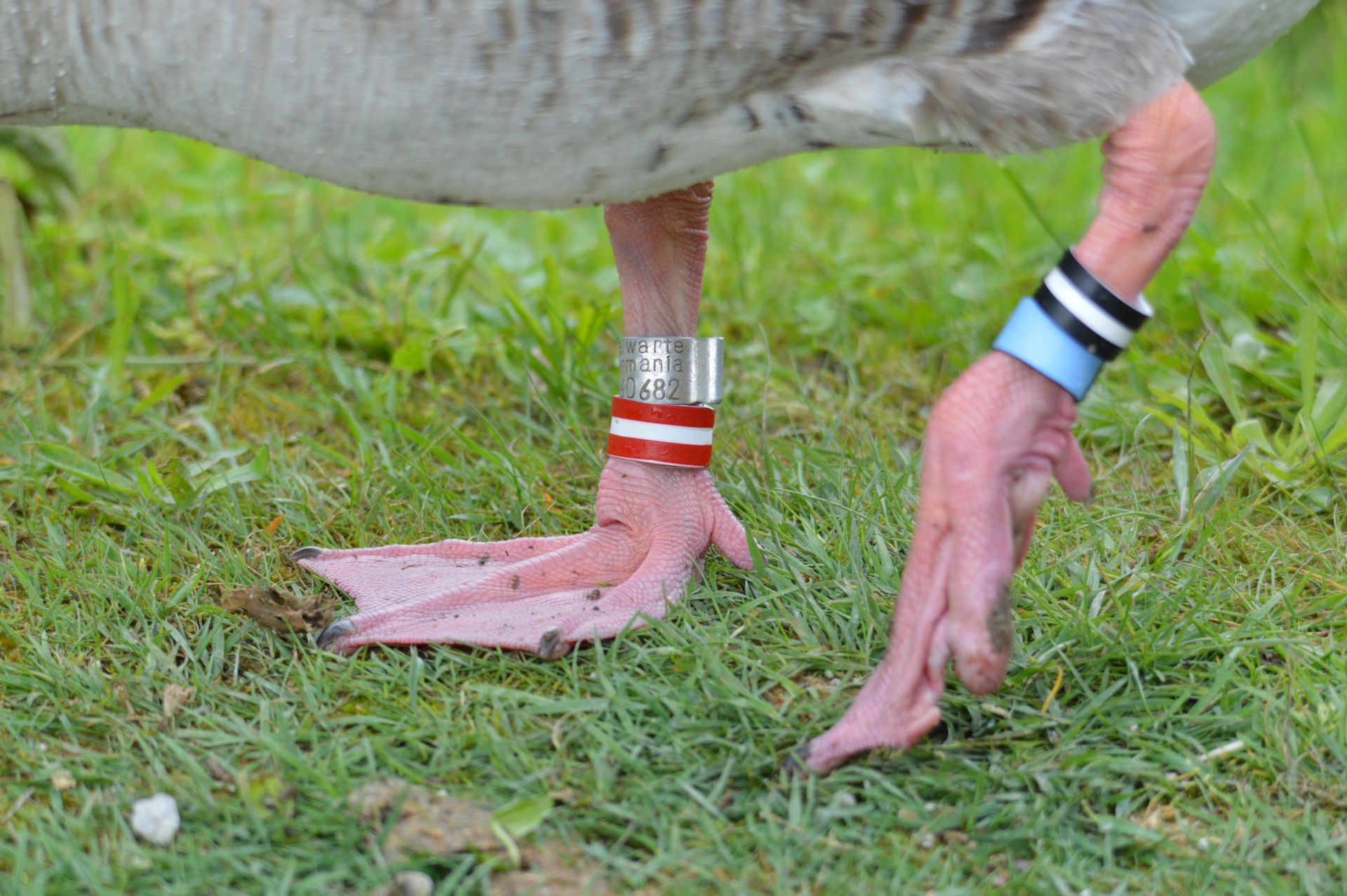 Beringte Graugans im Wildpark Grünau im Almtal.